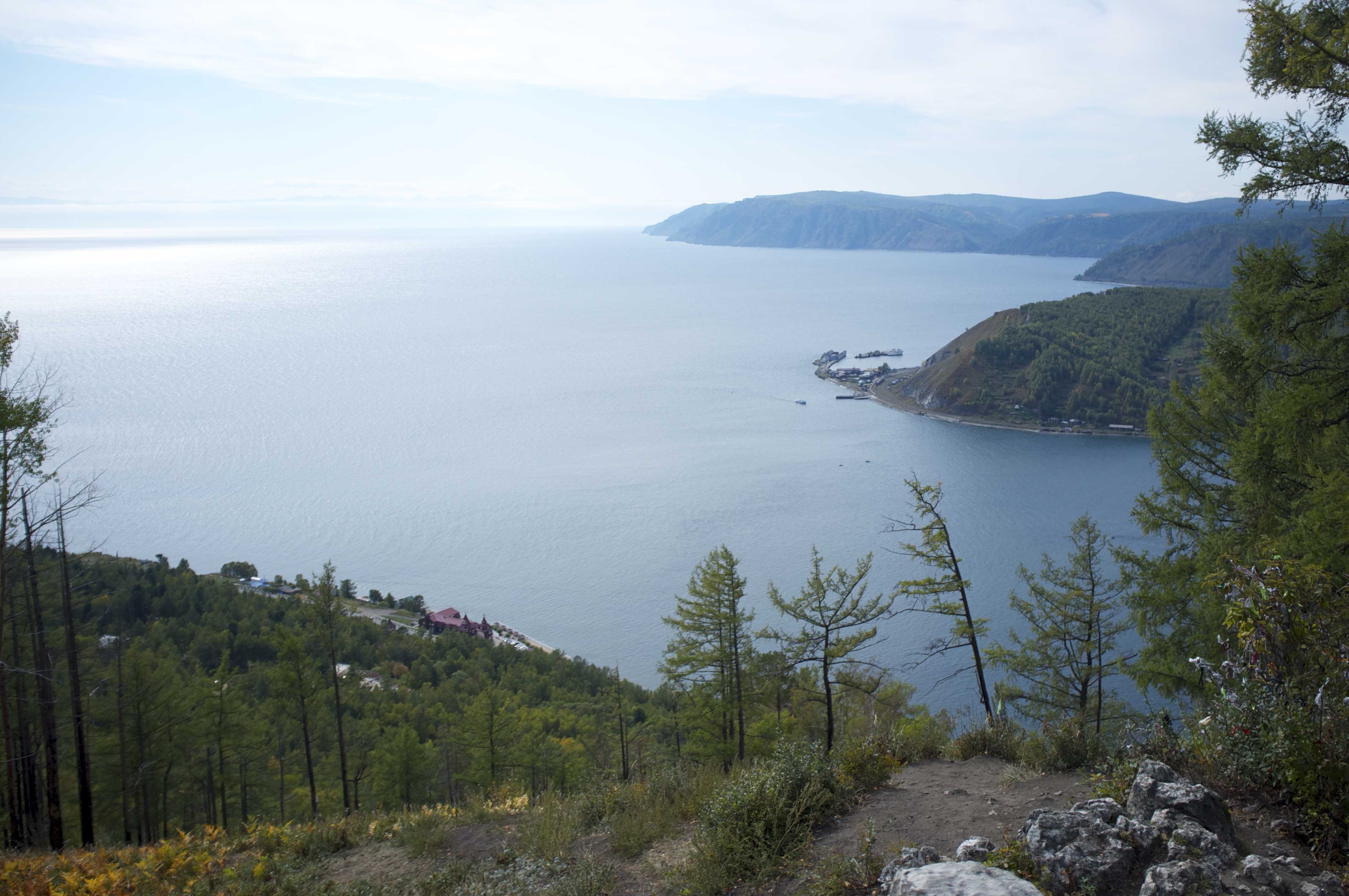 Lake Baikal